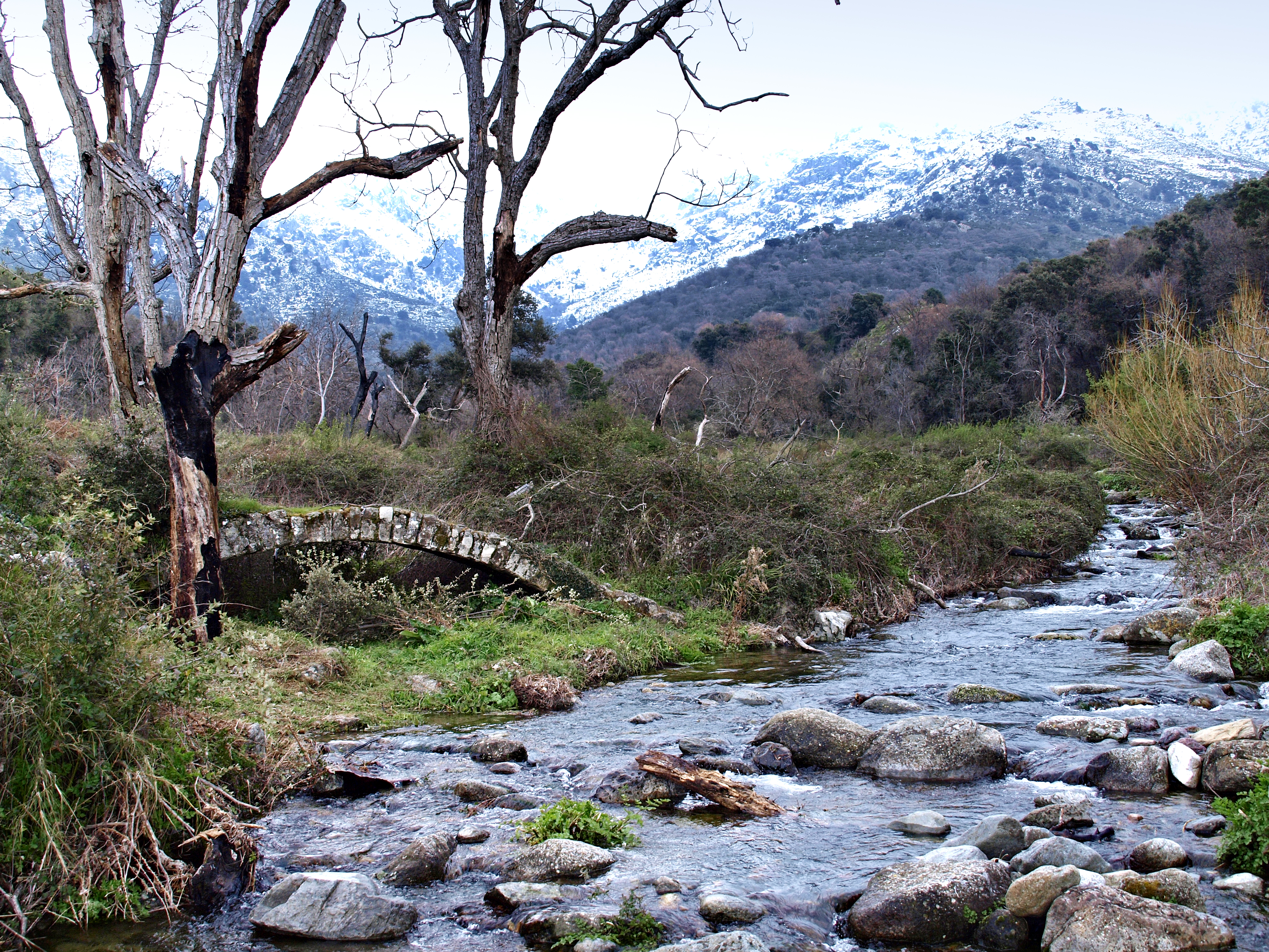 Zilia (Corse) - Vestiges du pont génois sur le ruisseau de Lette